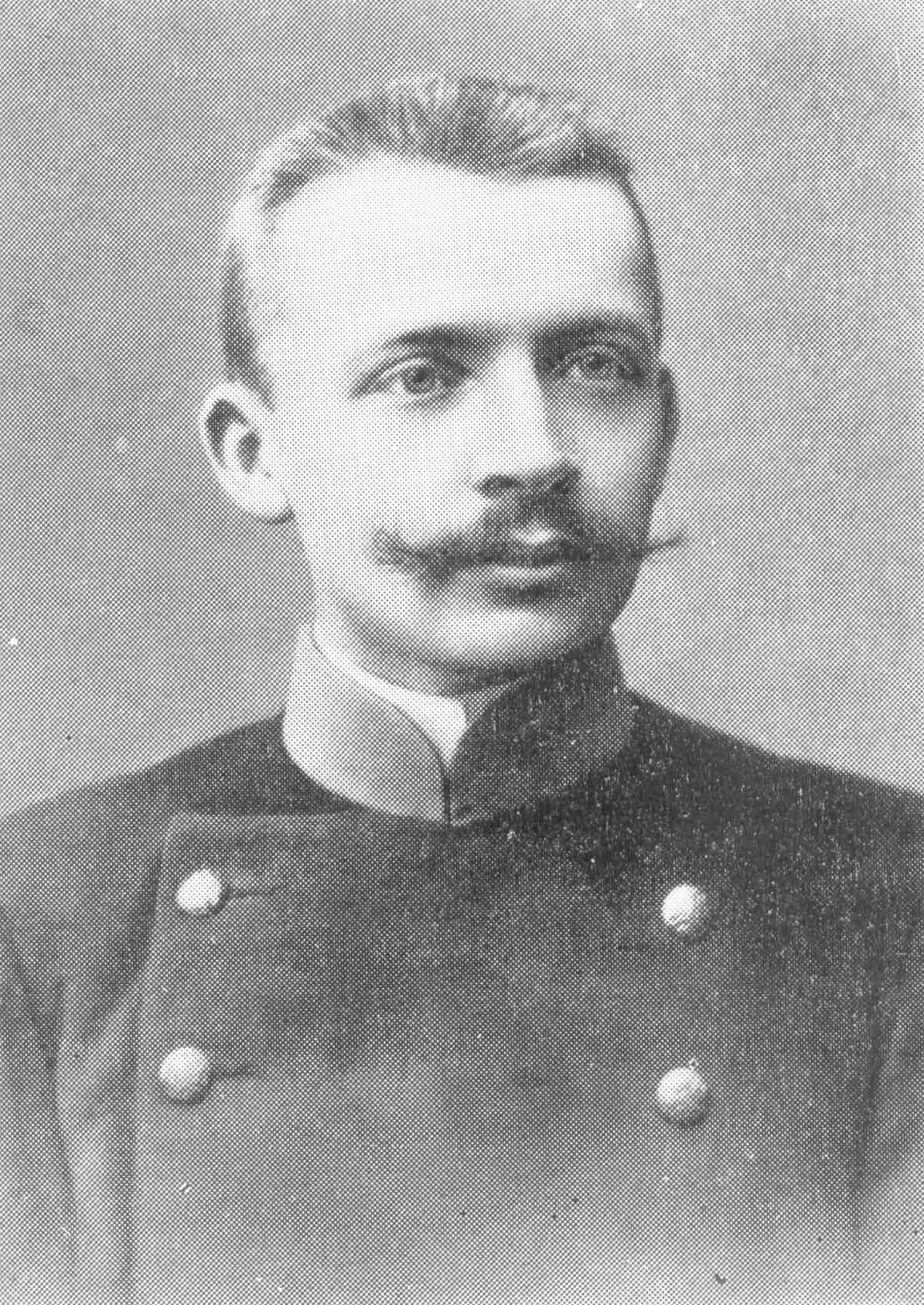 Leonid Vladímorovich Assur estudiante de gimnasio